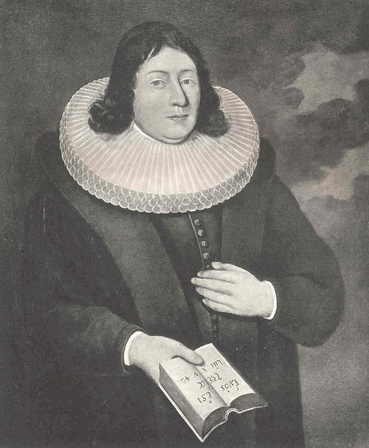 Sogneprest og bygdemålsdikter Hans Paus (1656-1715)